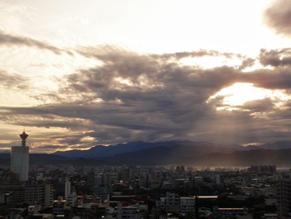 台灣的台中盆地（台中都會區）